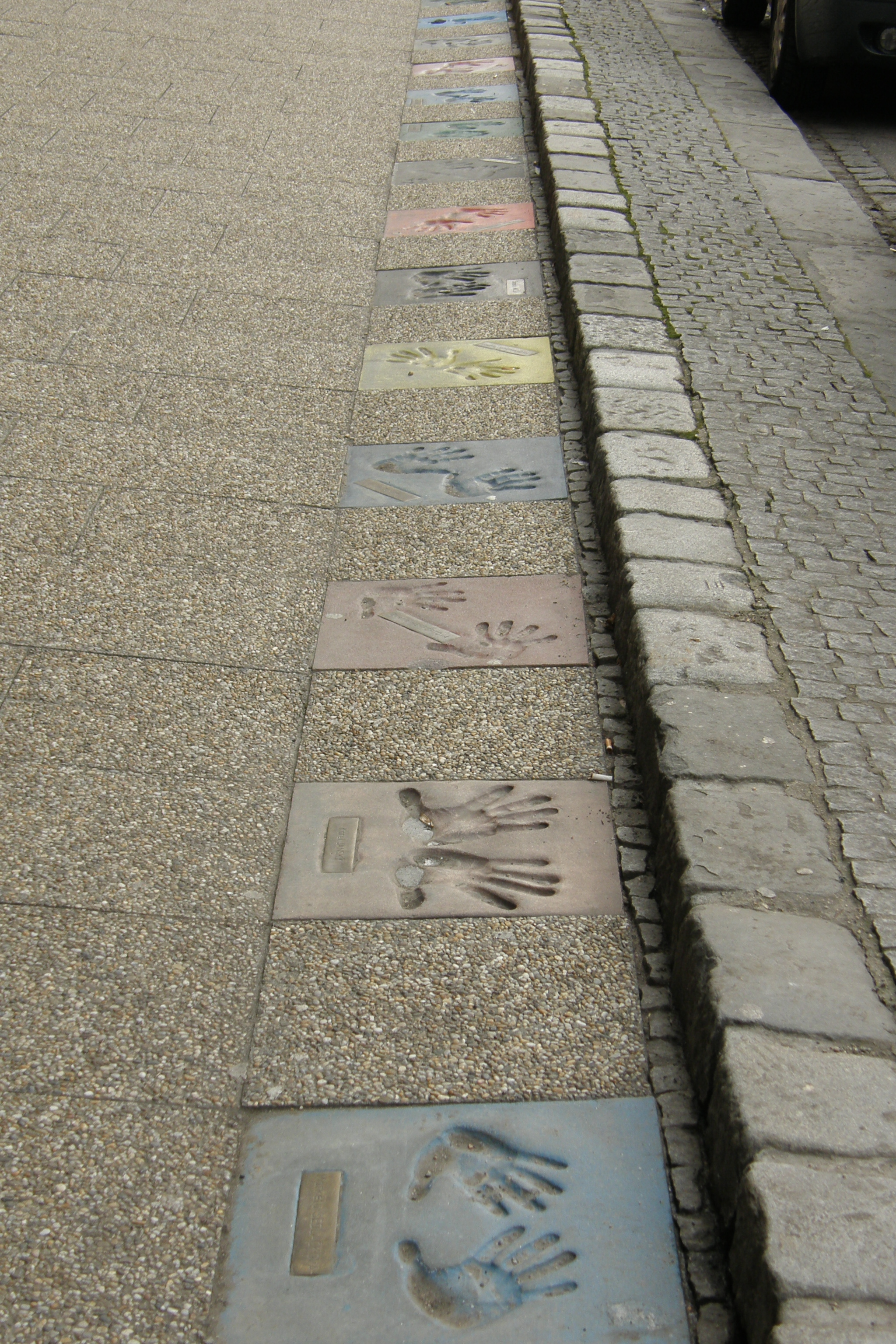 Chodník slávy u Městského divadla v Brně